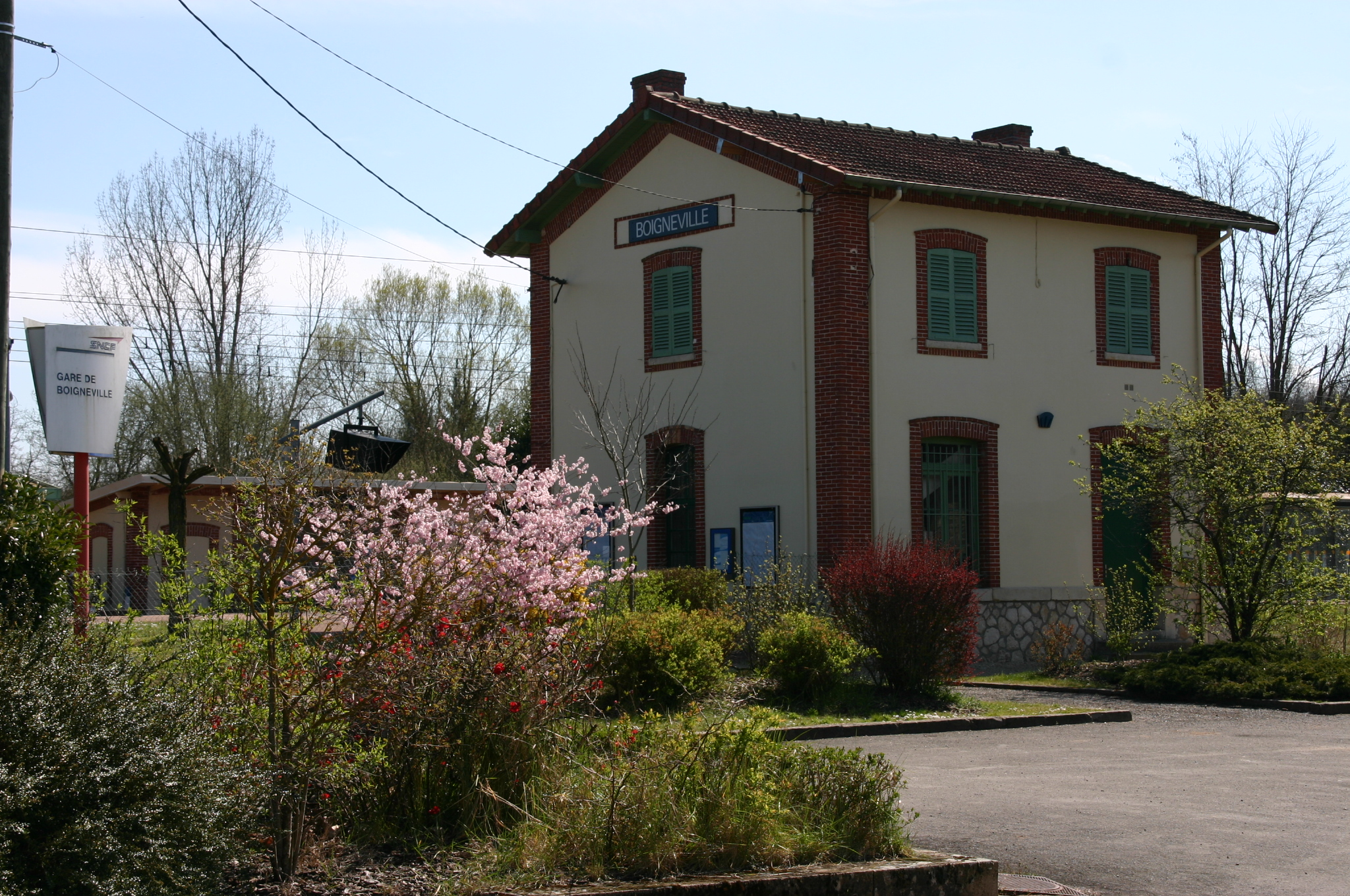 Gare de Boigneville, Essonne (France)